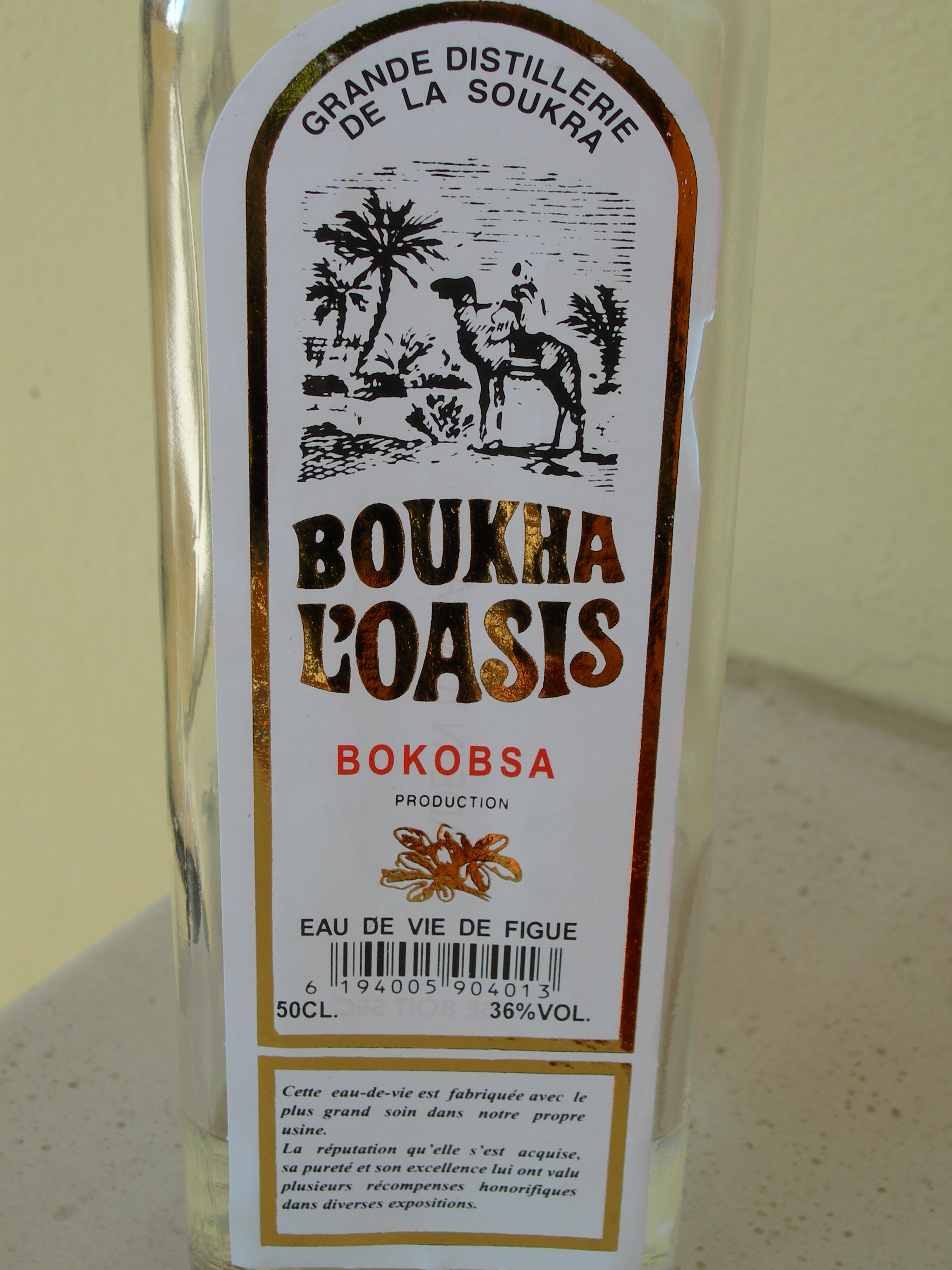 Étiquette d'une bouteille de boukha tunisienne